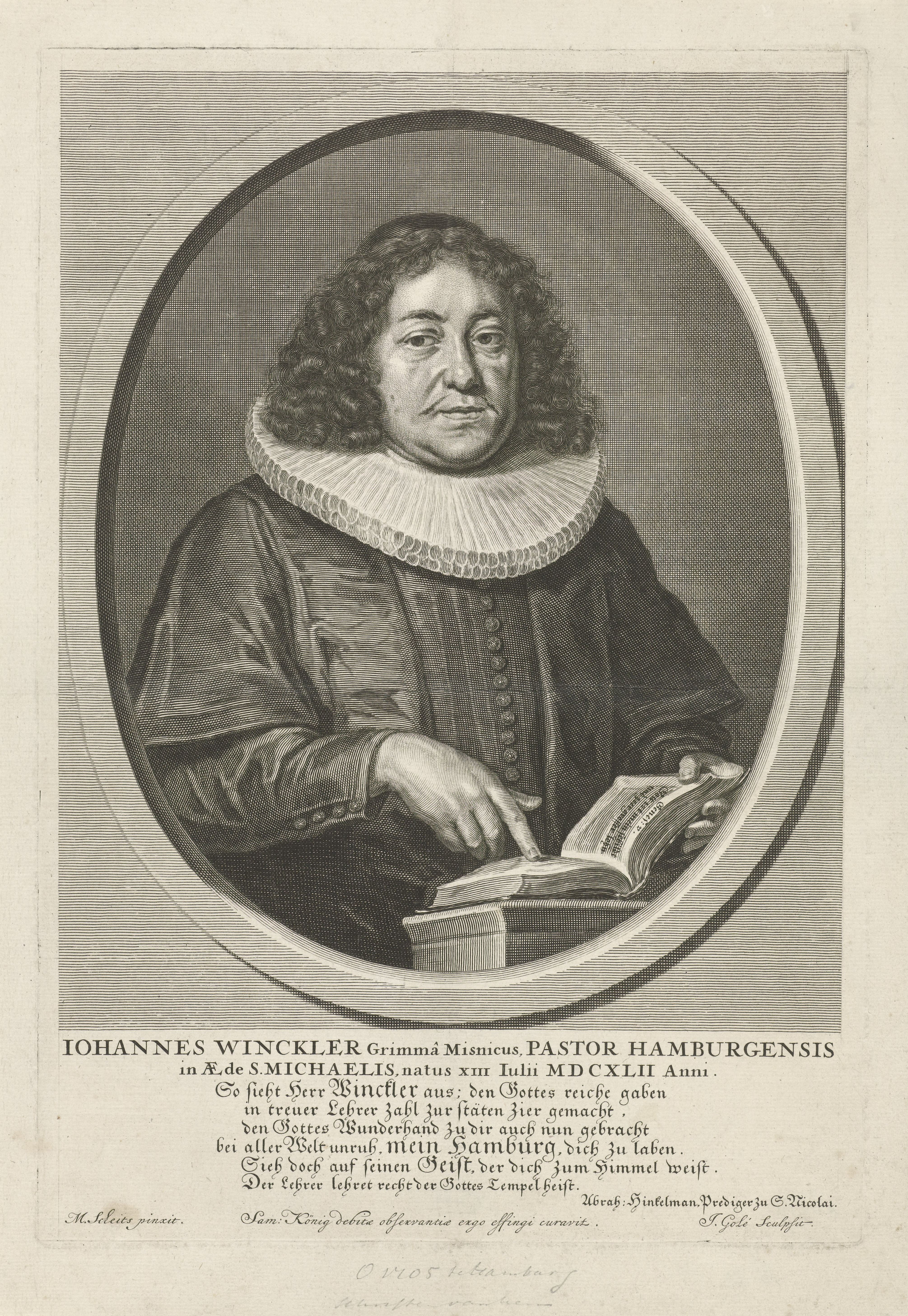 IdentificatieTitel(s): Portret van Johann WincklerObjecttype: prent Objectnummer: RP-P-1883-A-6853Catalogusreferentie: Hollstein Dutch 23-3(3)Opschriften / Merken: verzamelaarsmerk, verso midden onder, gestempeld: Lugt 2228Omschrijving: Portret in ovale lijst van Johann Winckler, een Hamburgse predikant en professor in Oosterse talen. De prent heeft een Duits onderschrift.VervaardigingVervaardiger: prentmaker: Jacob Gole (vermeld op object)naar schilderij van: David van der Plas (vermeld op object)schrijver: U. Hinckelman (vermeld op object)Plaats vervaardiging: AmsterdamDatering: 1670 - 1724Fysieke kenmerken: gravureMateriaal: papier Techniek: graveren (drukprocedé)Afmetingen: plaatrand: h 335 mm × b 234 mmOnderwerpWie: Johann WincklerVerwerving en rechtenVerwerving: aankoop feb-1883Copyright: Publiek domein